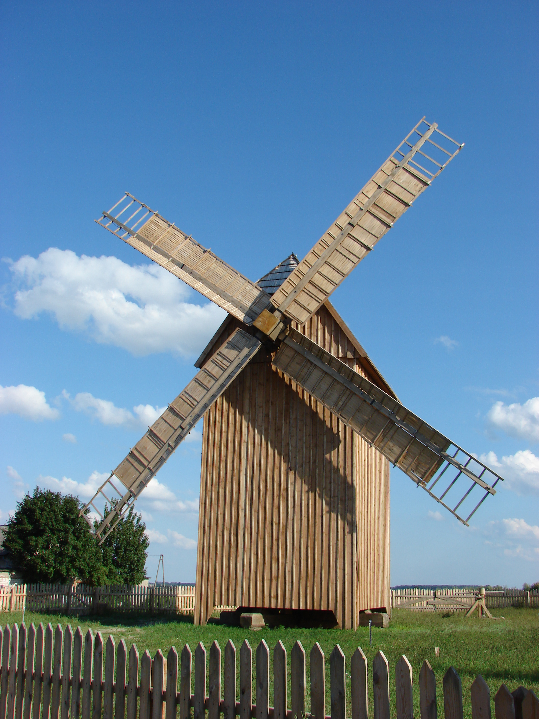 Wiatrak w Bierzgłowie, Gmina Łubianka